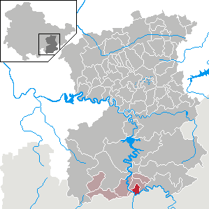 Blankenberg in Thuringia - Saale-Orla-Kreis